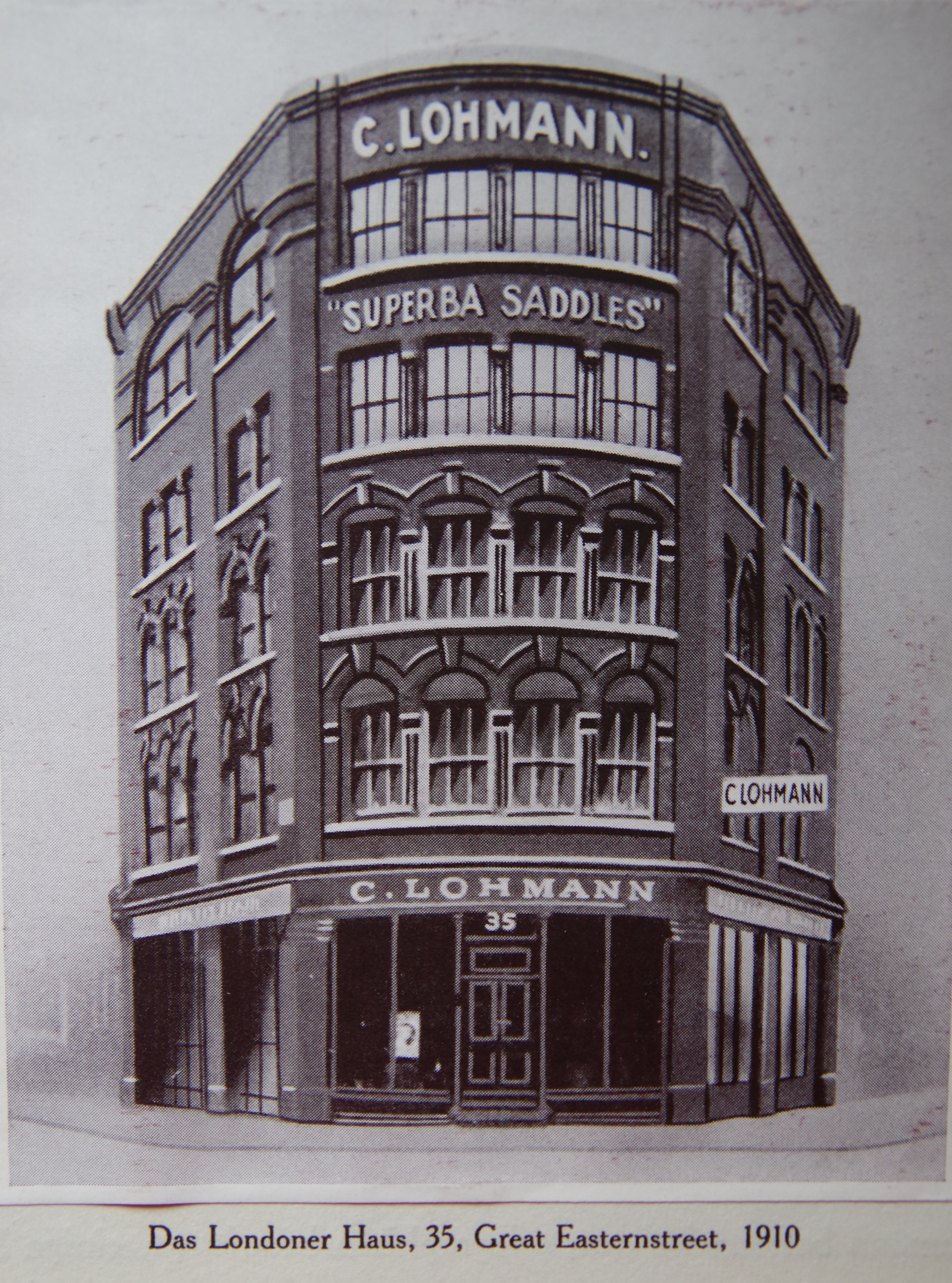 Das Handelshaus wurde nach dem ersten Weltkrieg enteignet